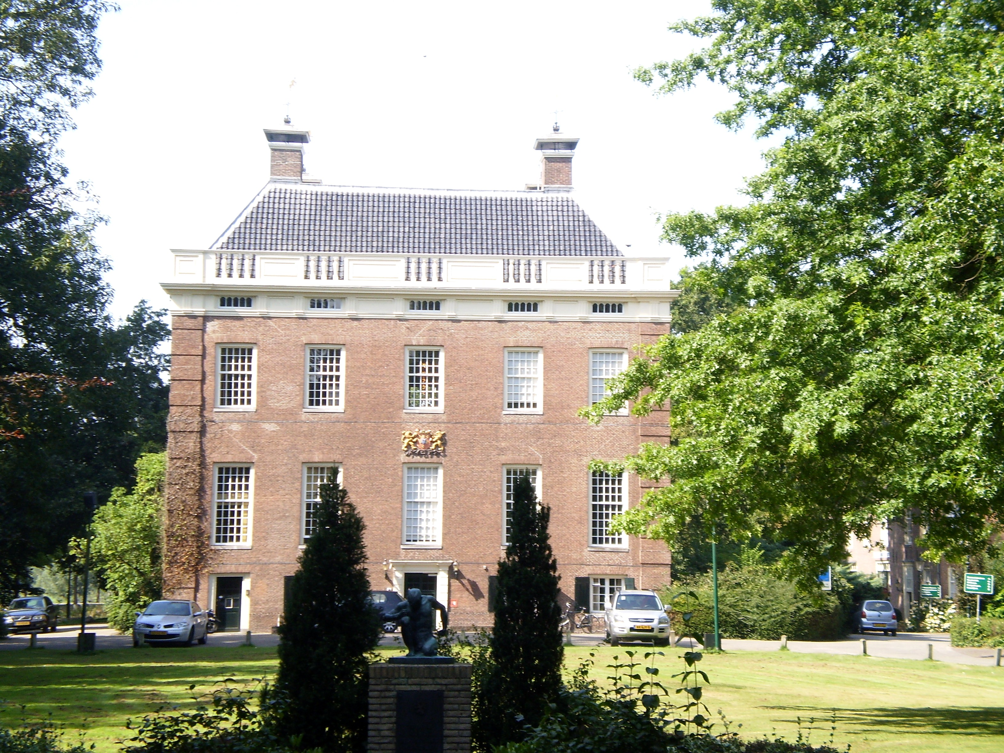 Oanbean troch Swarte Kees op 19 augustus 2009